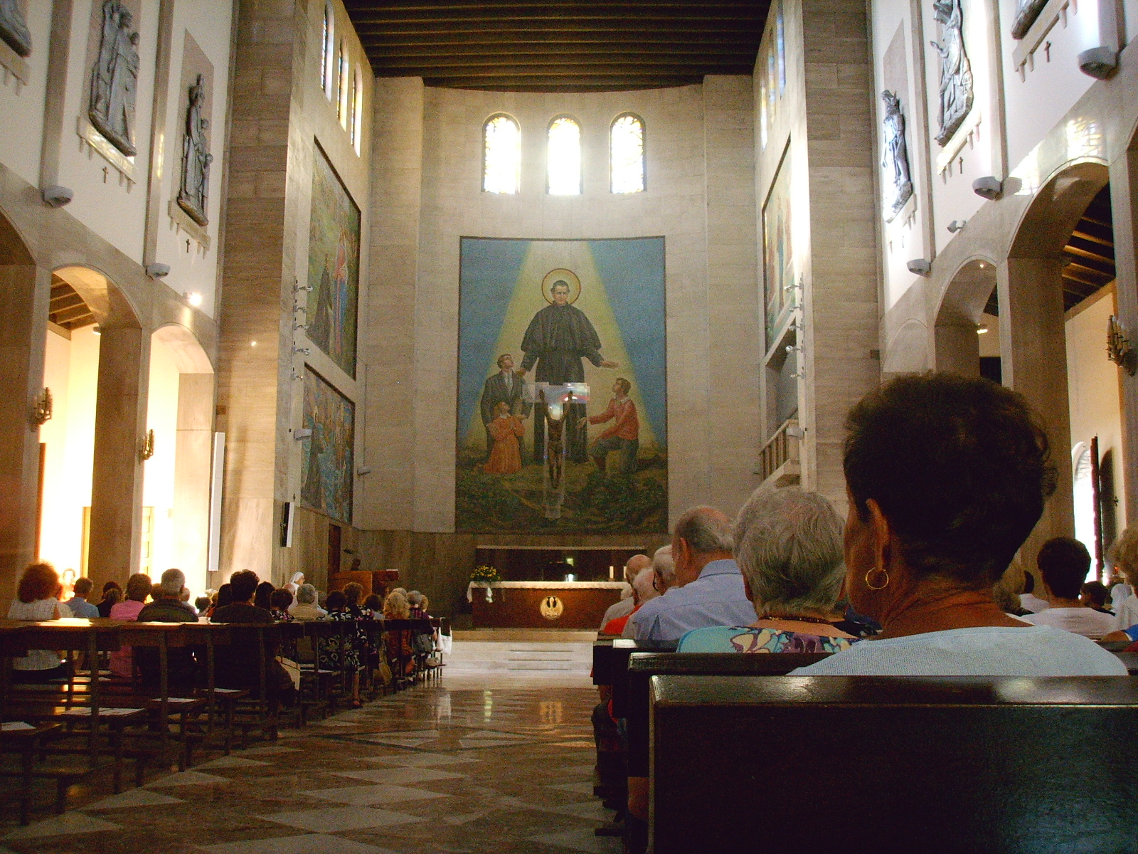 Viareggio, chiesa di don bosco interno